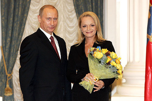 Лариса Долина